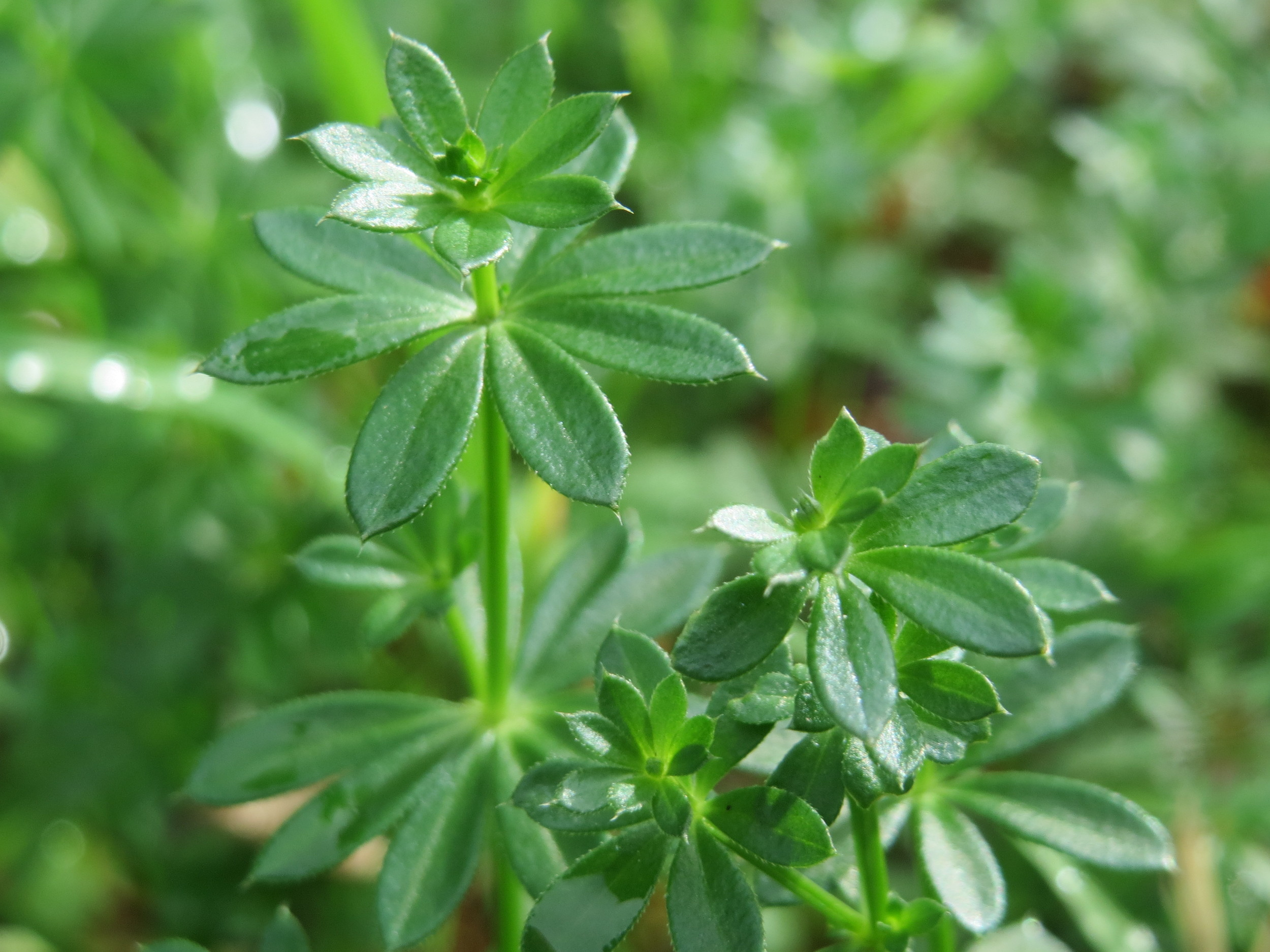 Wiesenlabkraut (Galium mollugo) im Landesgartenschaupark Hockenheim